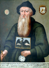 Niccol Longobardo (* 1565, † 1654), Missionar